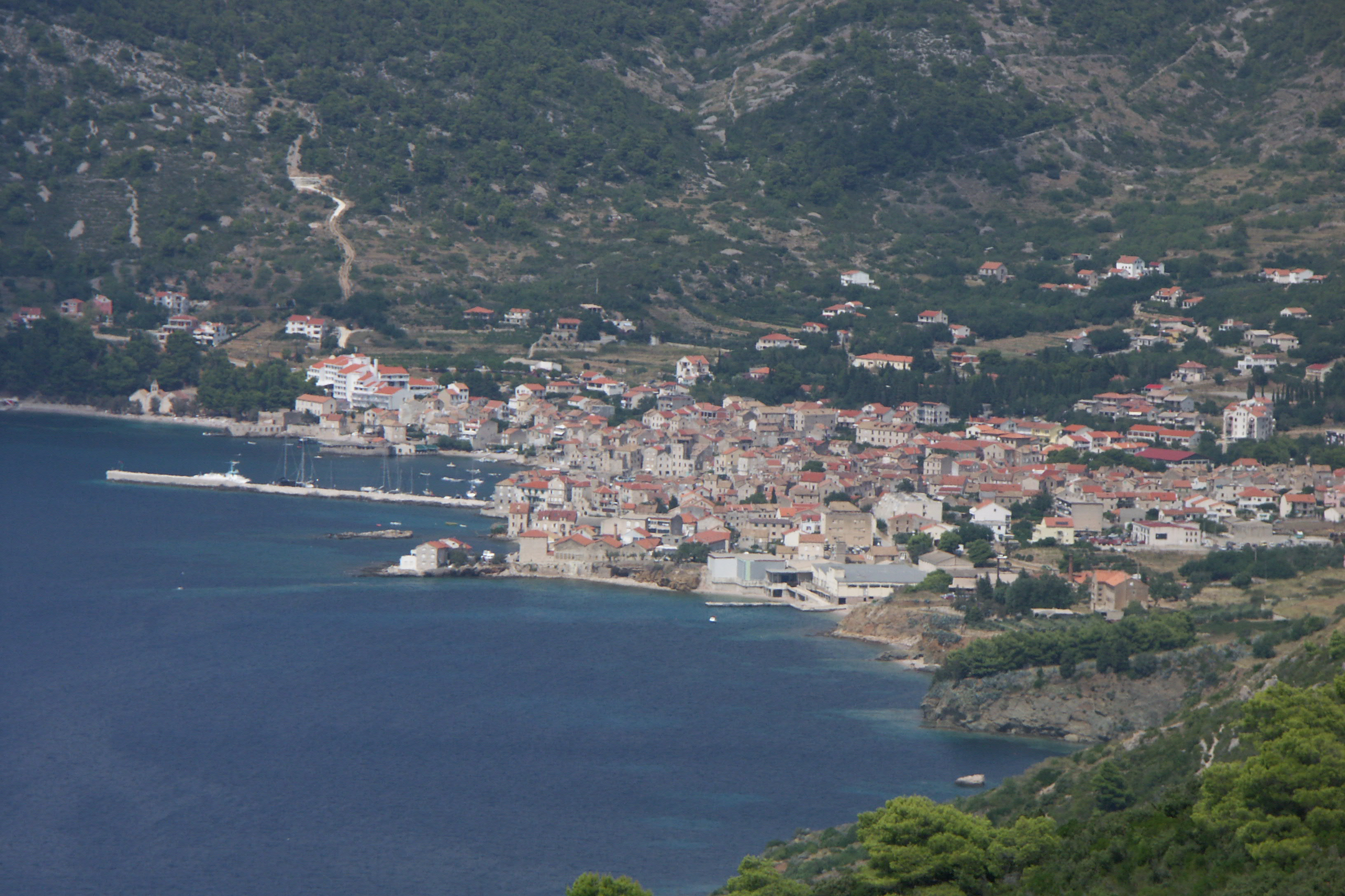 Bild von Komiza (vis)